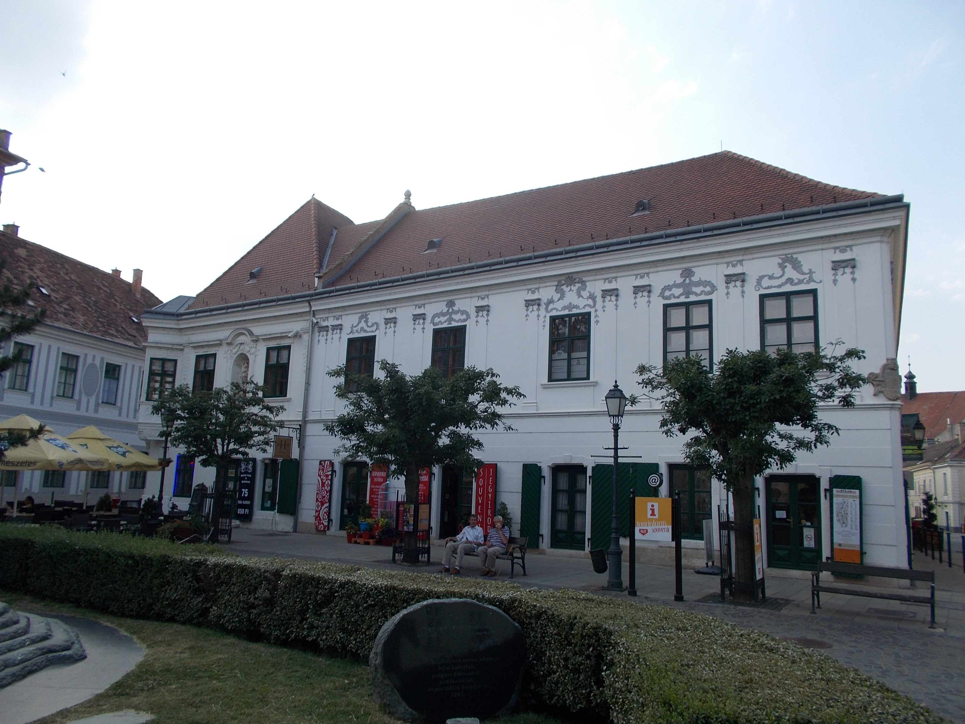 Hiemer-ház, Műemlék ID 3834. Városház téri homlokzat - Magyarország, Fejér megye, Székesfehérvár, Belváros, Jókai utca, 1, Városház tér. This is a photo of a monument in Hungary, Identifier: 3834